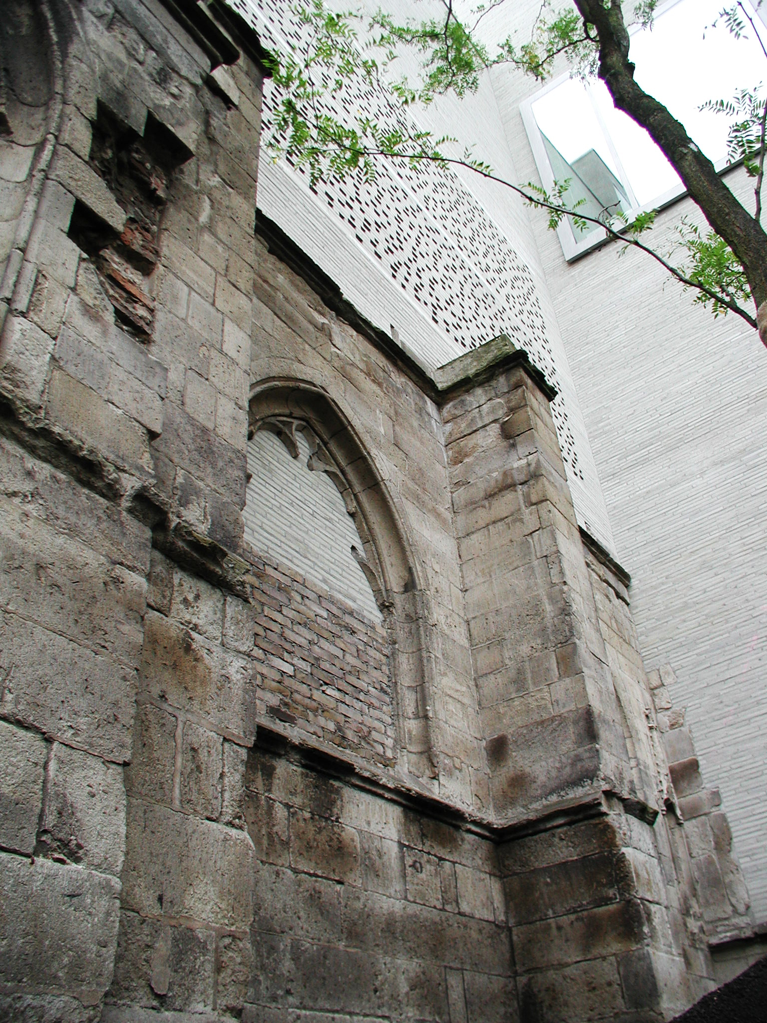 Köln, erhaltenes Außenmauerwerk St-Kolumba-Kölm, Kolumbahof